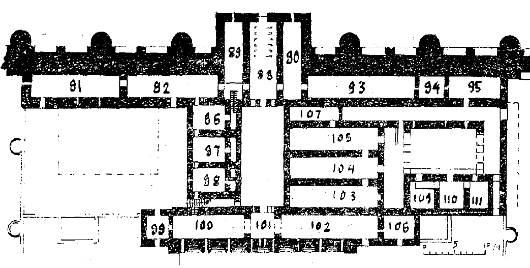 مخطط الطابق الأول لمبنى قصر الأخيضر من كتاب لمس بيل